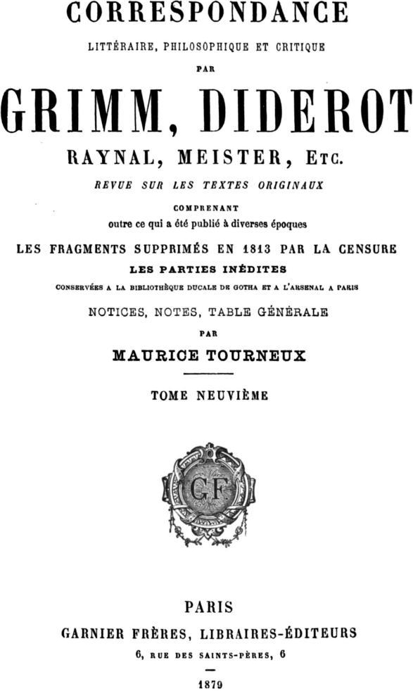 First page of the Correspondance littéraire, philosophique et critique by Friedrich Melchior von Grimm (1723-1807).